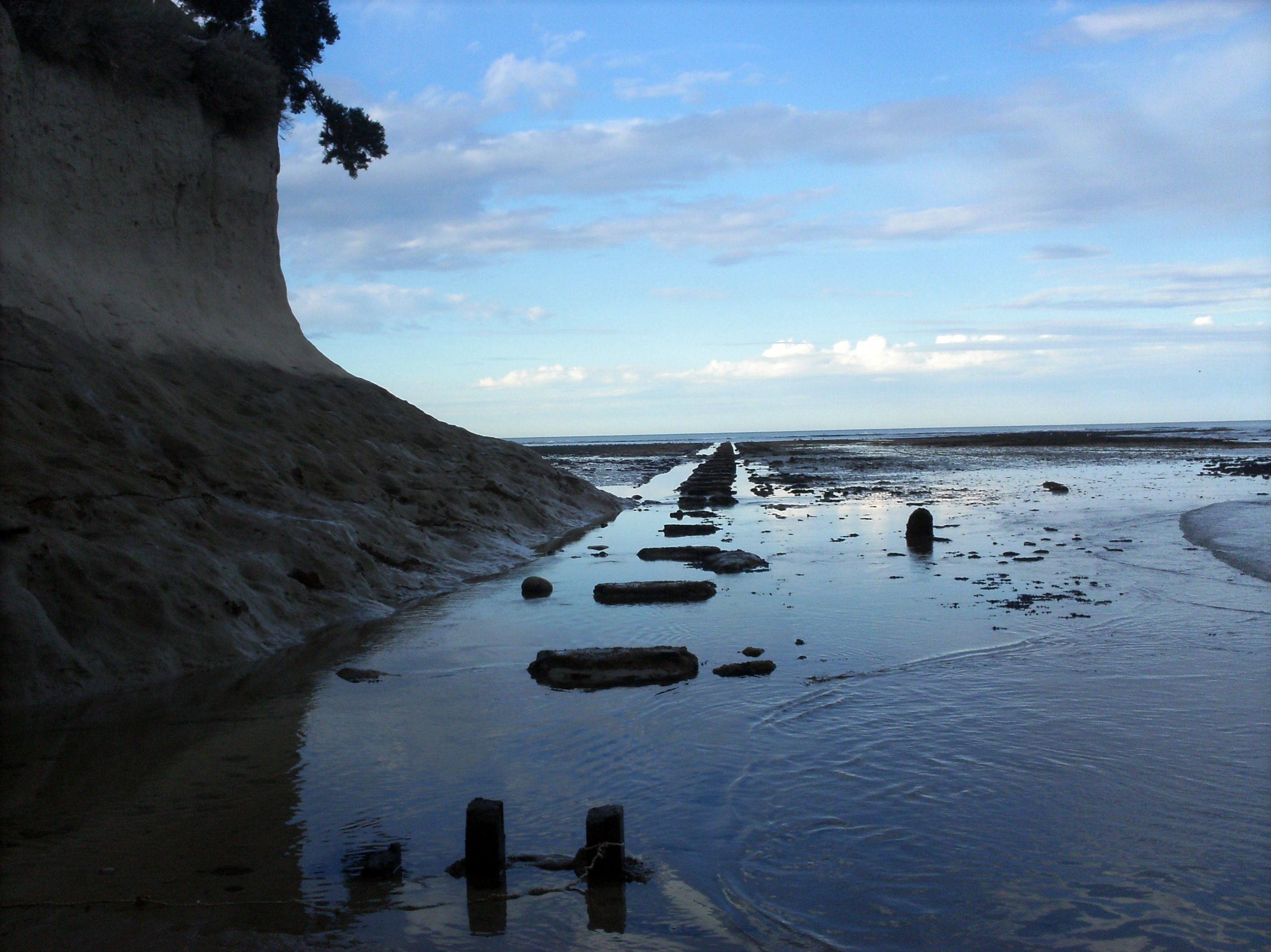 antiguo muelle destruido por el abando y la acción de la erosión marina